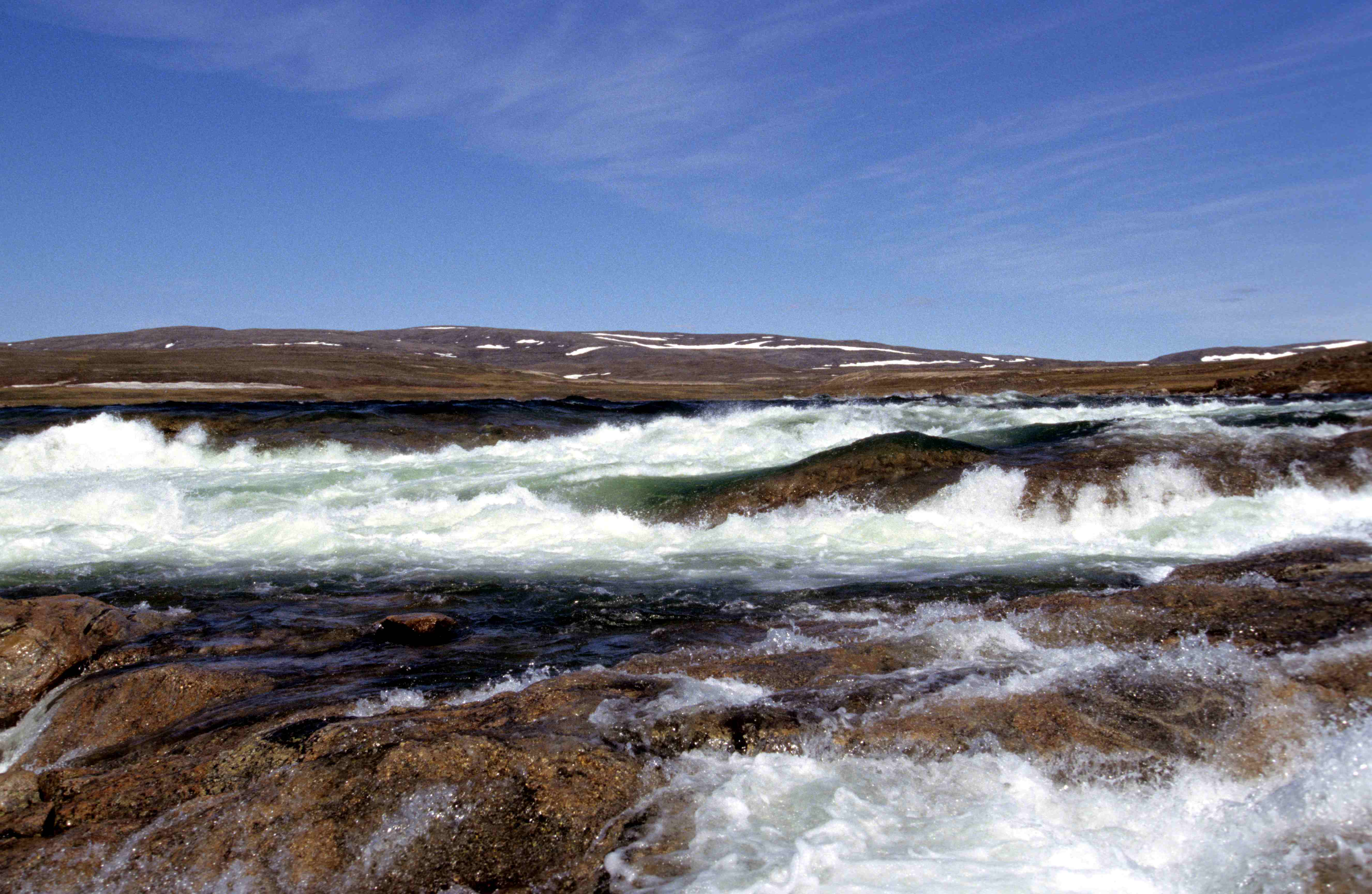 Sila River, 2nd waterfall (Ukkusiksalik National Park, Nunavut, Canada)